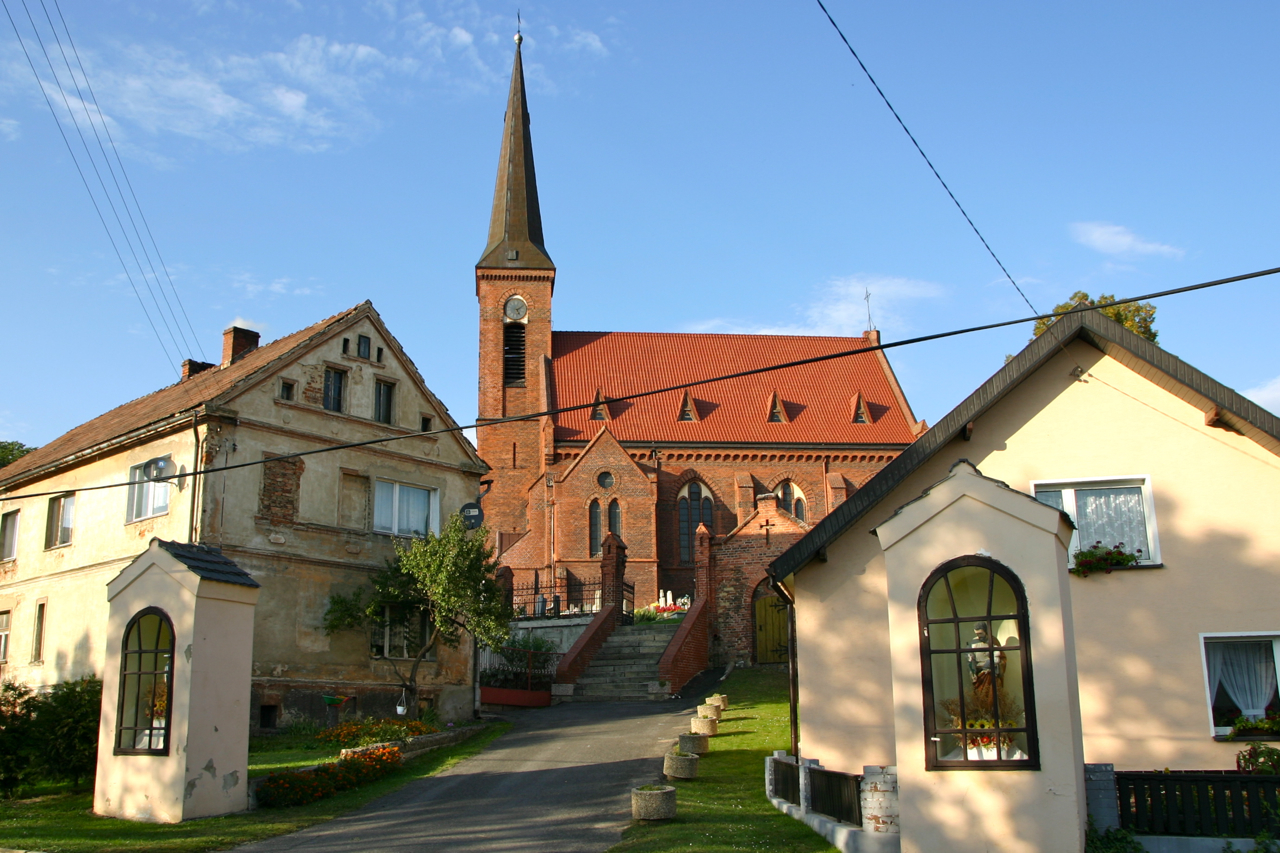 Prężyna (dodatkowa nazwa w j. niem. Groß Pramsen) – wieś w Polsce położona w województwie opolskim, w powiecie prudnickim, w gminie Biała.